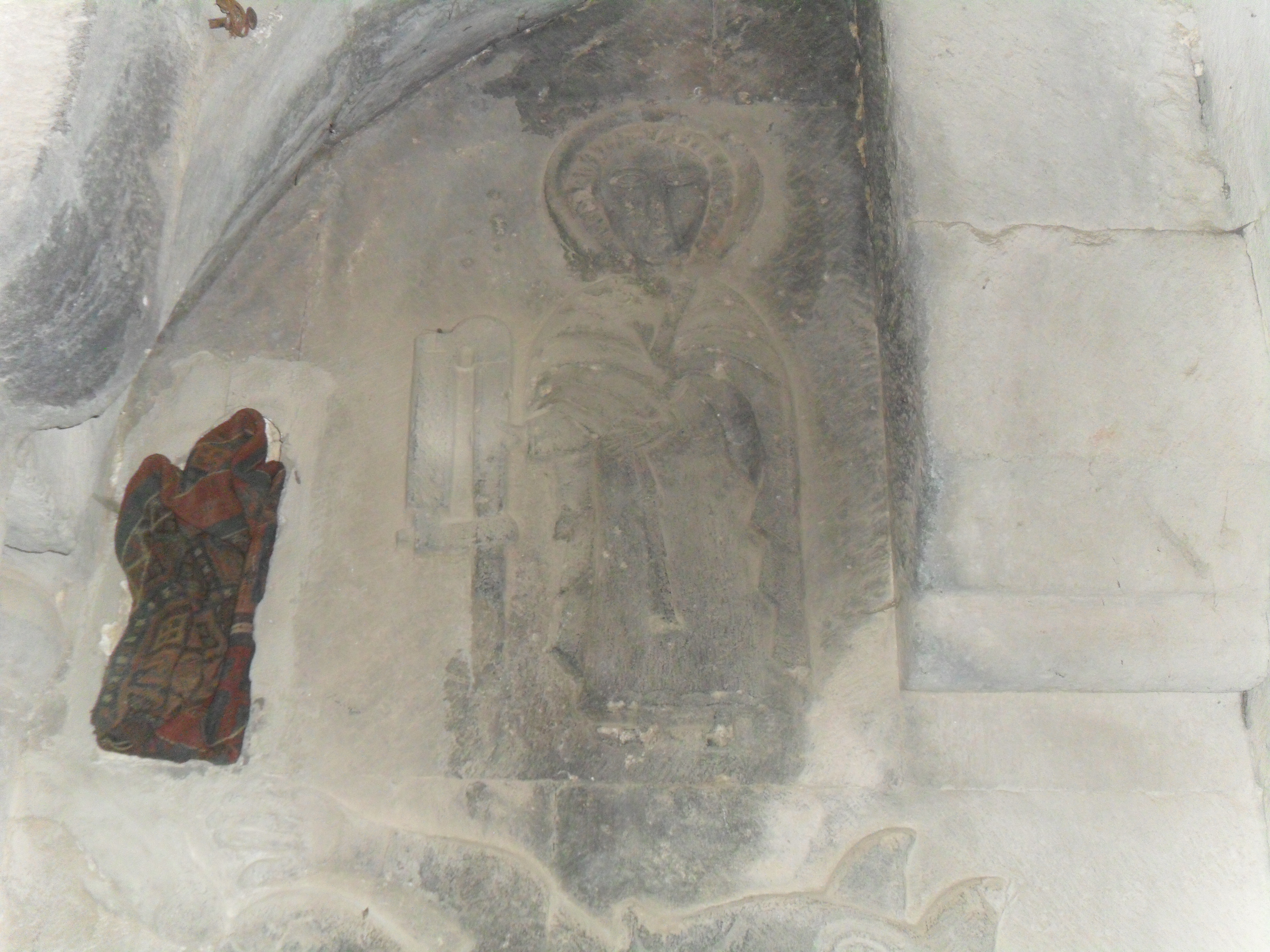 Սբ Գրիգոր Լուսավորչի քանդակը Խախուի վանքում